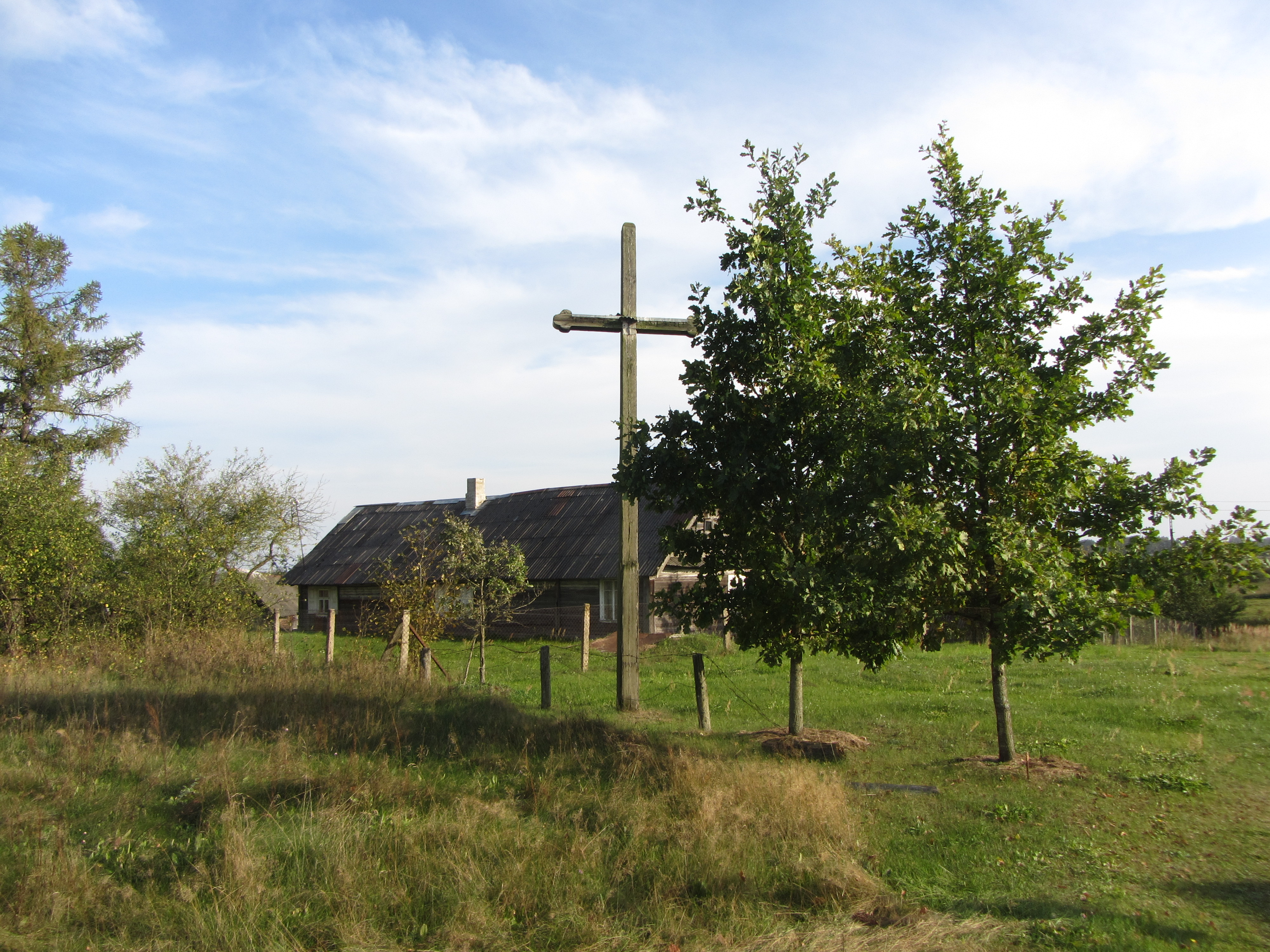 Kabeliai, Lithuania